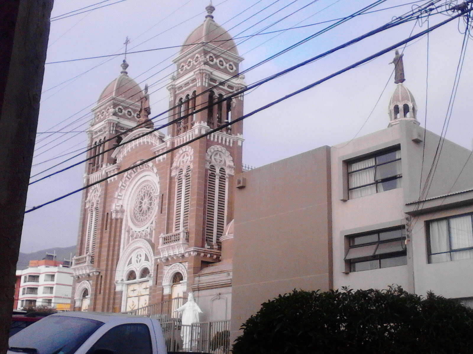 Esta imagen de la Iglesia Corazón de María ubicada en Antofagasta, Chile